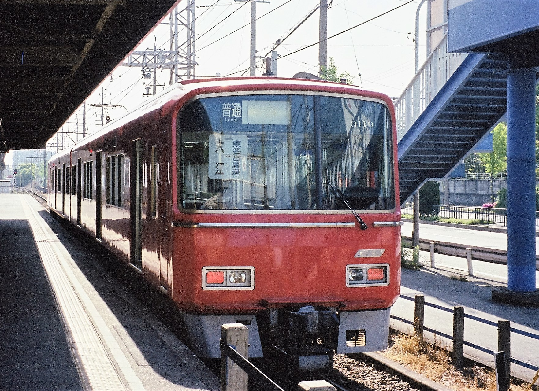 東名古屋港駅に停車する名鉄築港線3100系電車（2003年5月撮影）